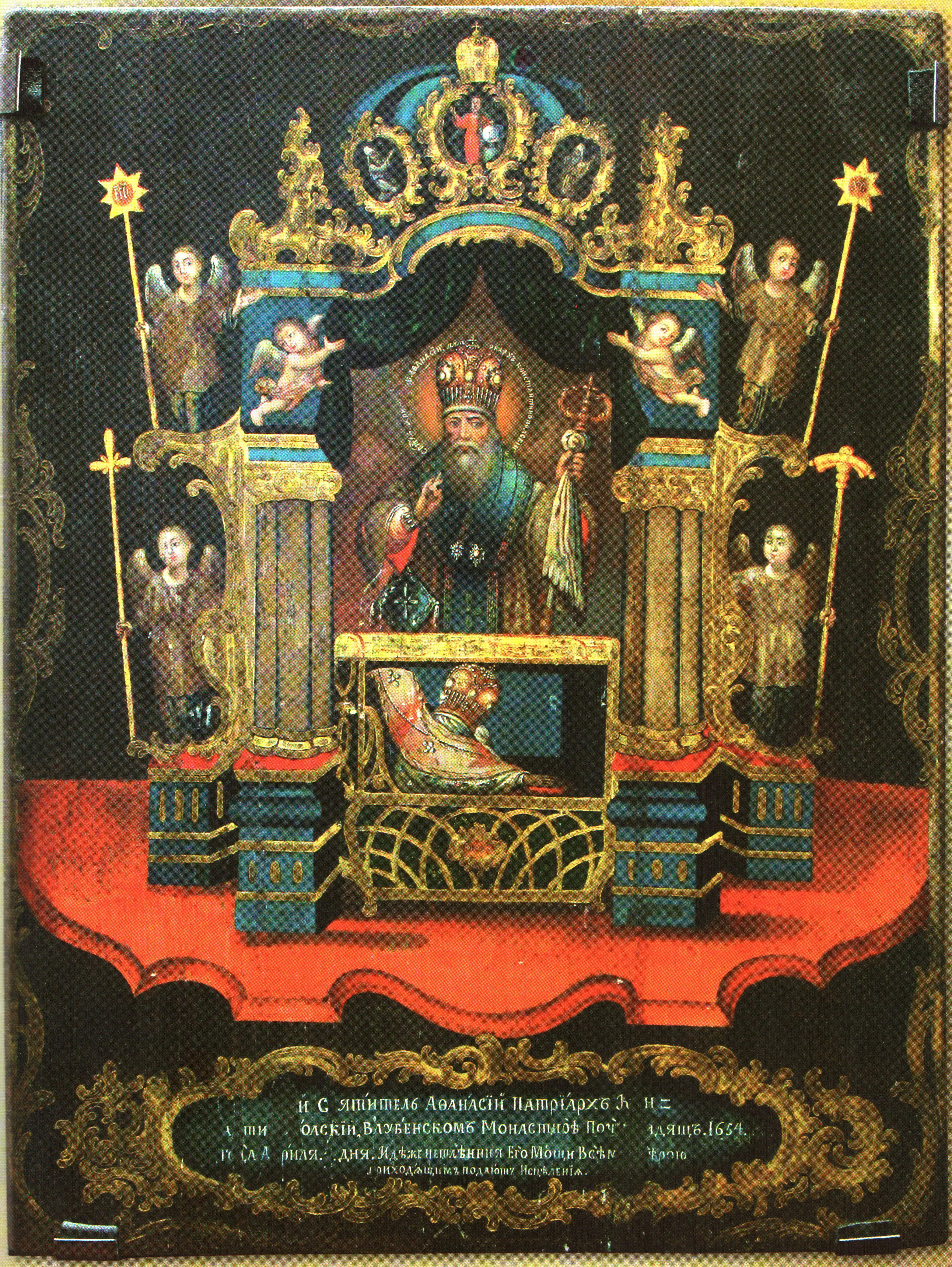 Неизвестный русский художник второй половины 17 века. Святитель Афанасий, Патриарх Константинопольский, в Лубенском монастире почив[ающий] сидящ. 1654 года... Русская икона.